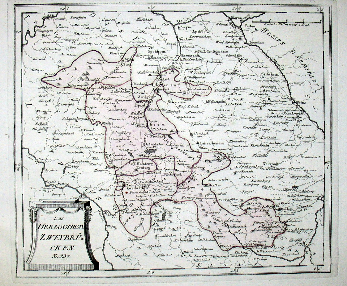 Das Herzogthum Zweybrücken. Nro. 237. Kolorierter Kupferstich